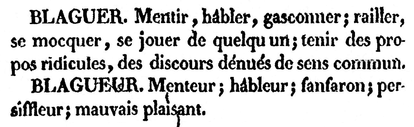 Définition de Blaguer et Blagueur dans le Dictionnaire du bas-langage ou des Manières de parler usitées parmi le peuple, de Charles-Louis D'Hautel (1808), page 94.